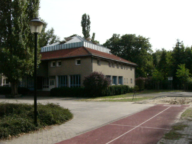 Canisius-Kolleg Berlin, Alfred-Delp-Haus